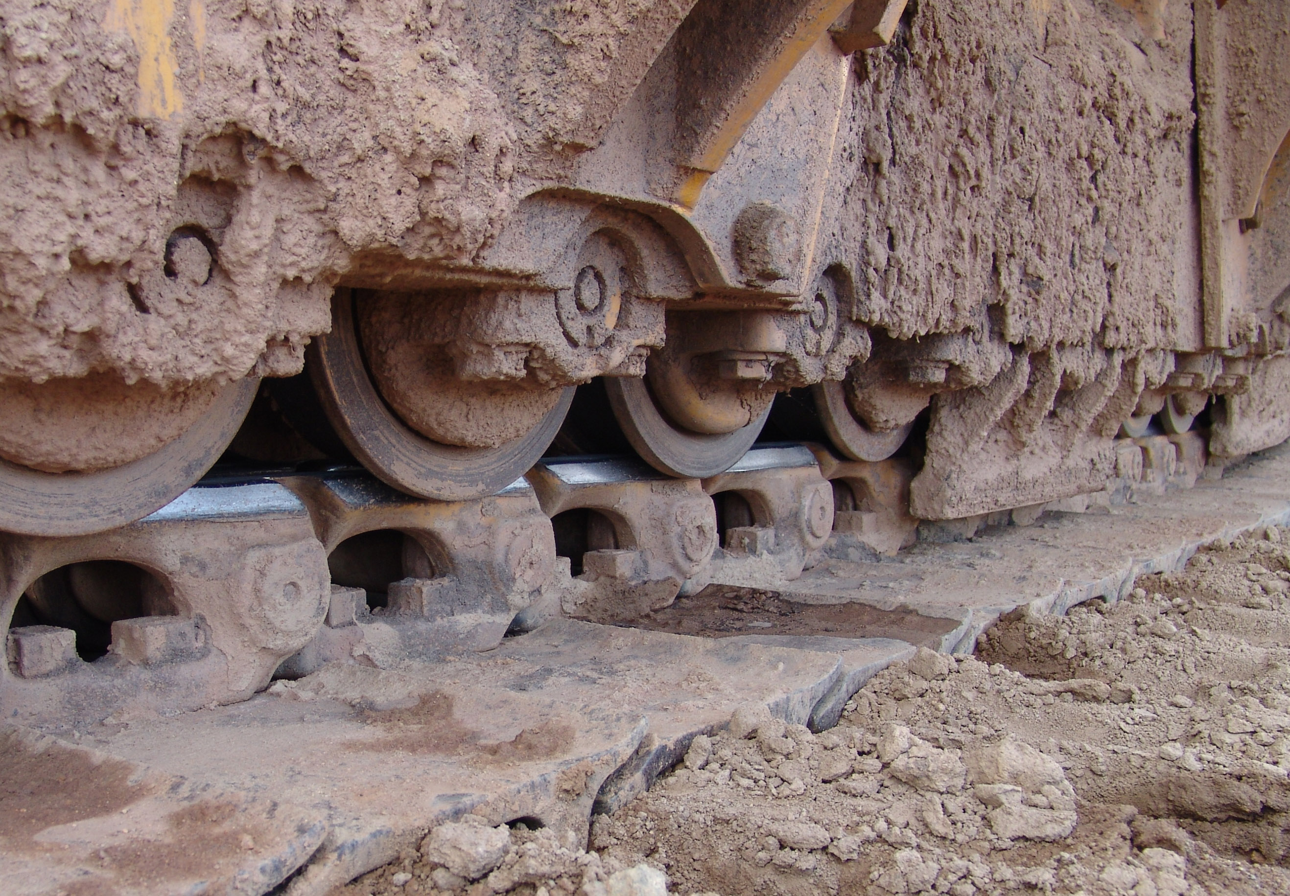 Komatsu Raupenkran